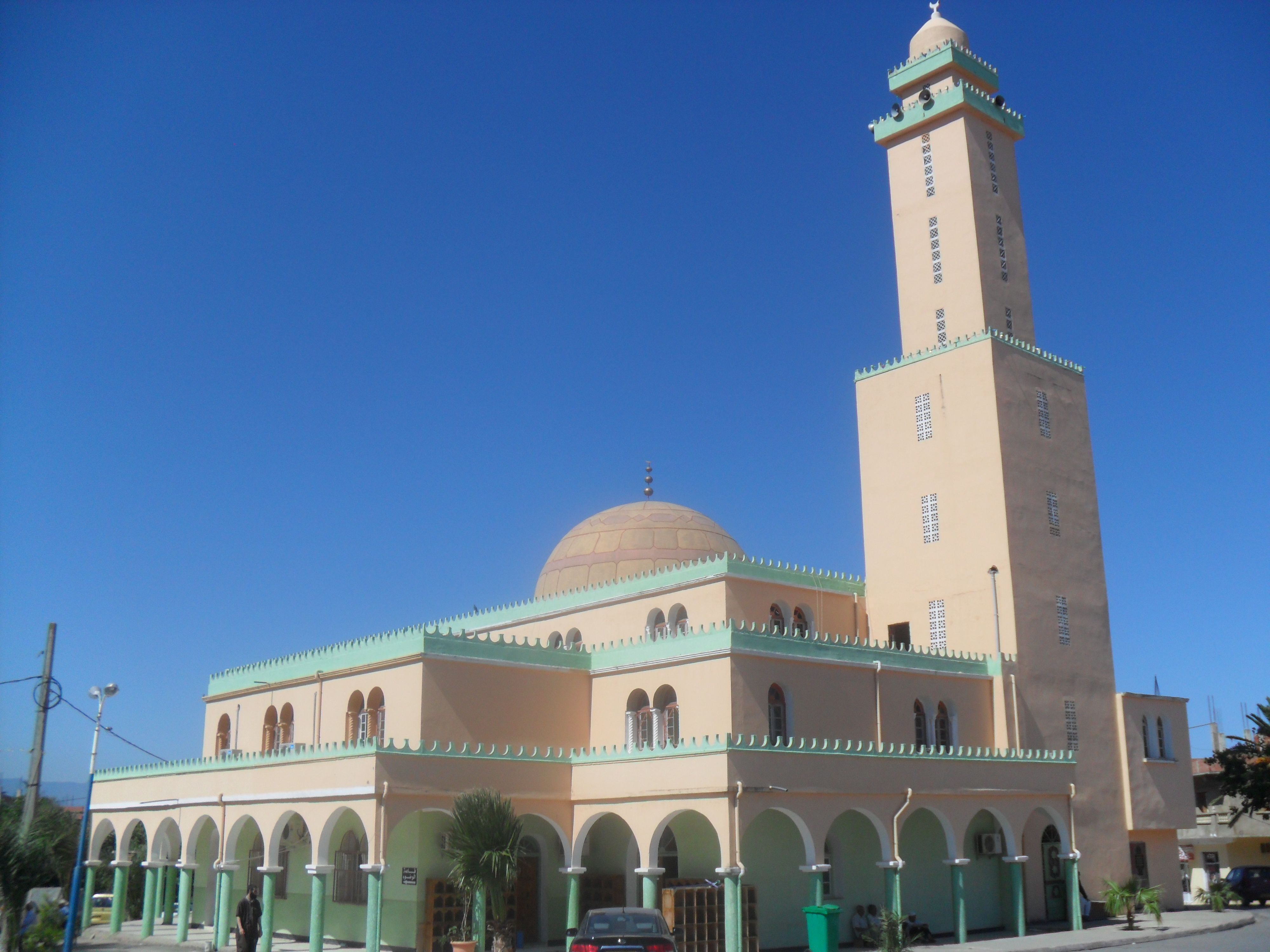 La Mosquée d'El kanner Centre (Algérie)